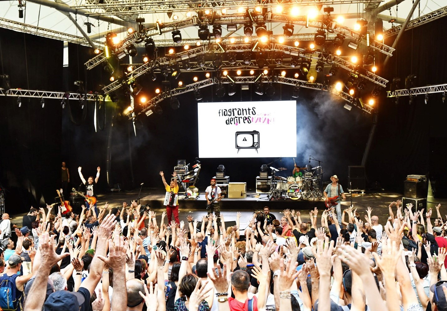 FLAGRANTS DELIRES au Festival de POUPET 2019